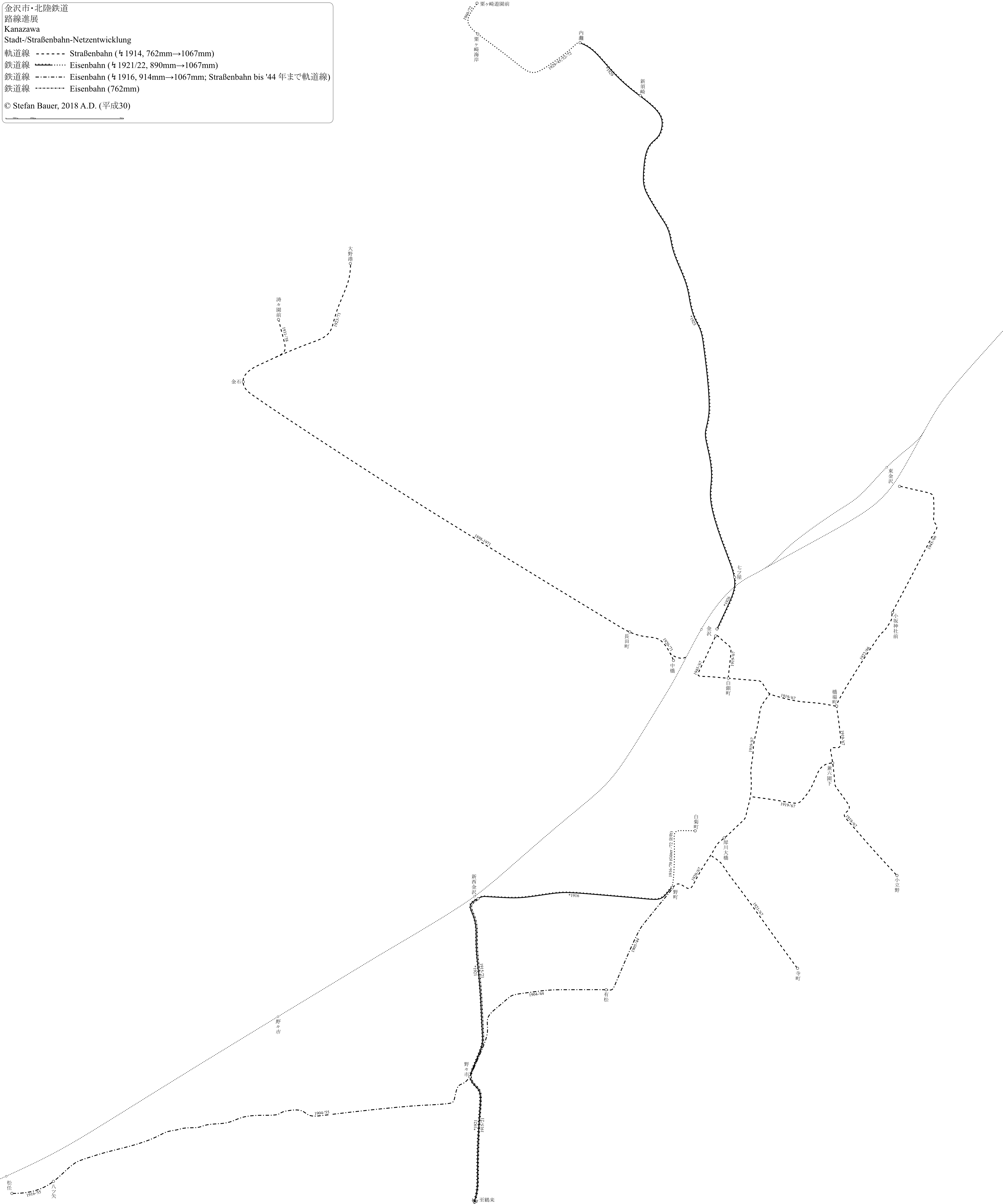 北陸鉄道の金沢市内軌道線の路線進展図